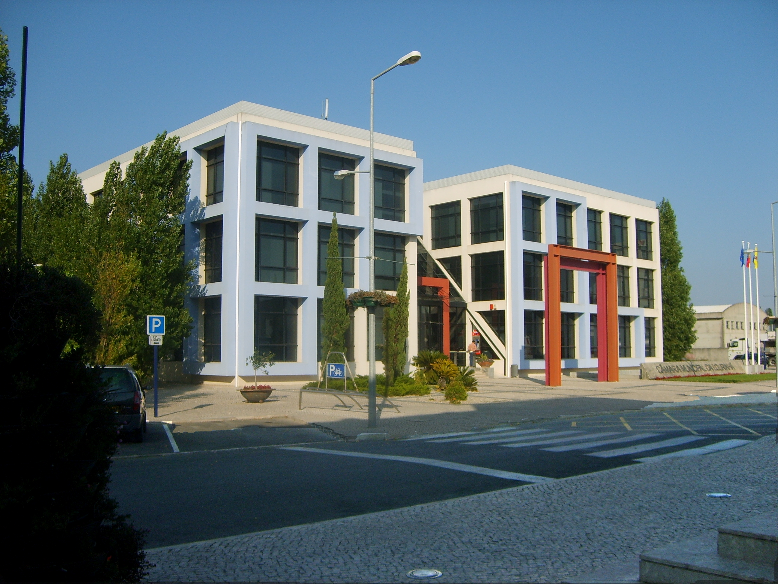 Mairie de Bourinha